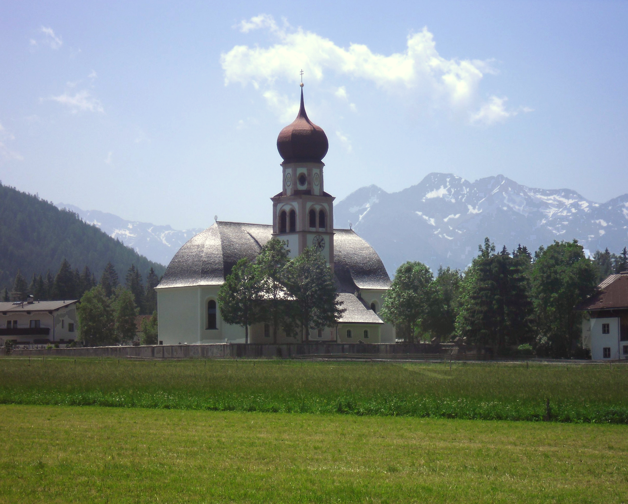 Kath. Pfarrkirche hl. Maria Magdalena und Friedhof